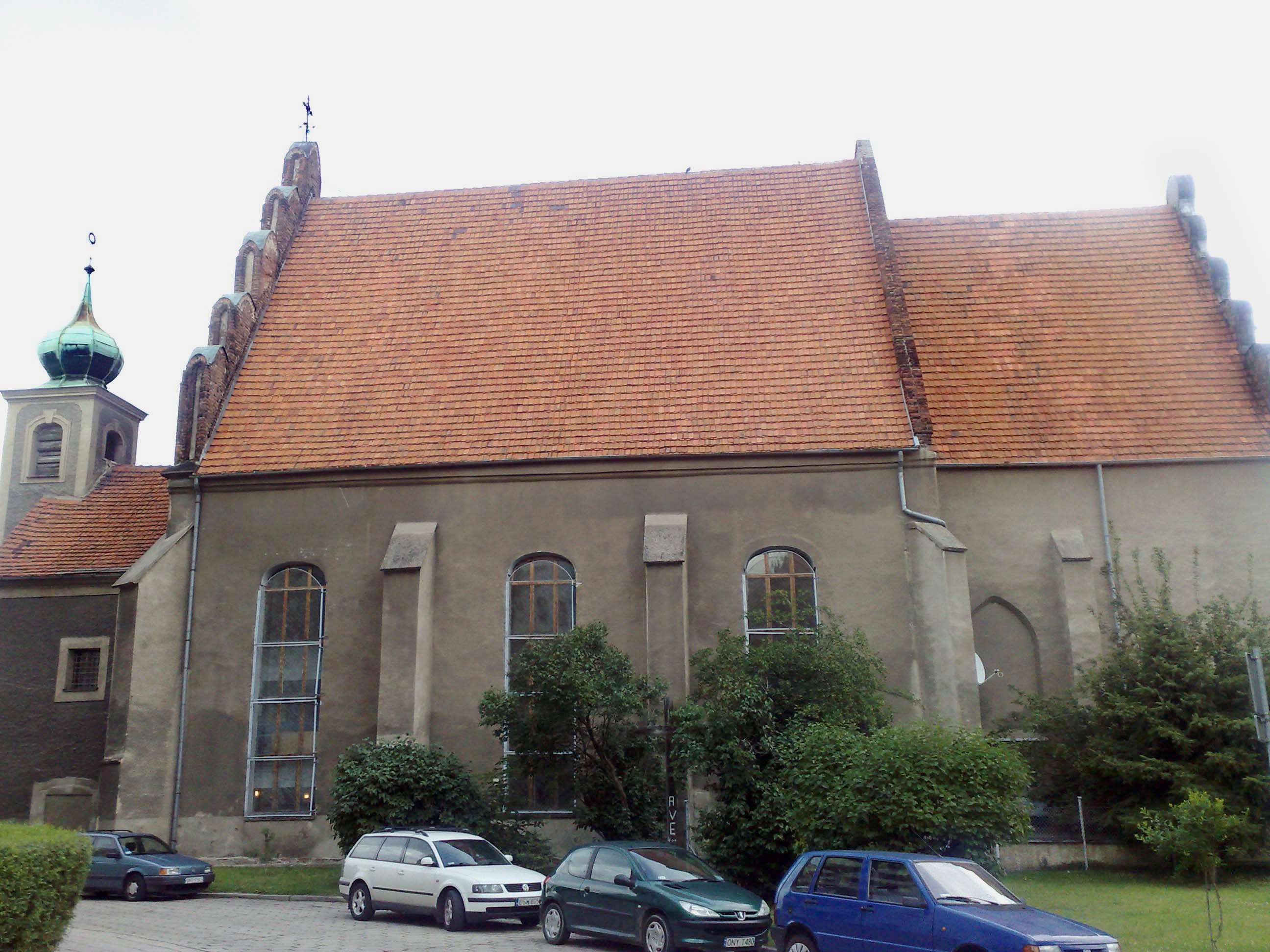 foto kpt Tomek Nysa 2012